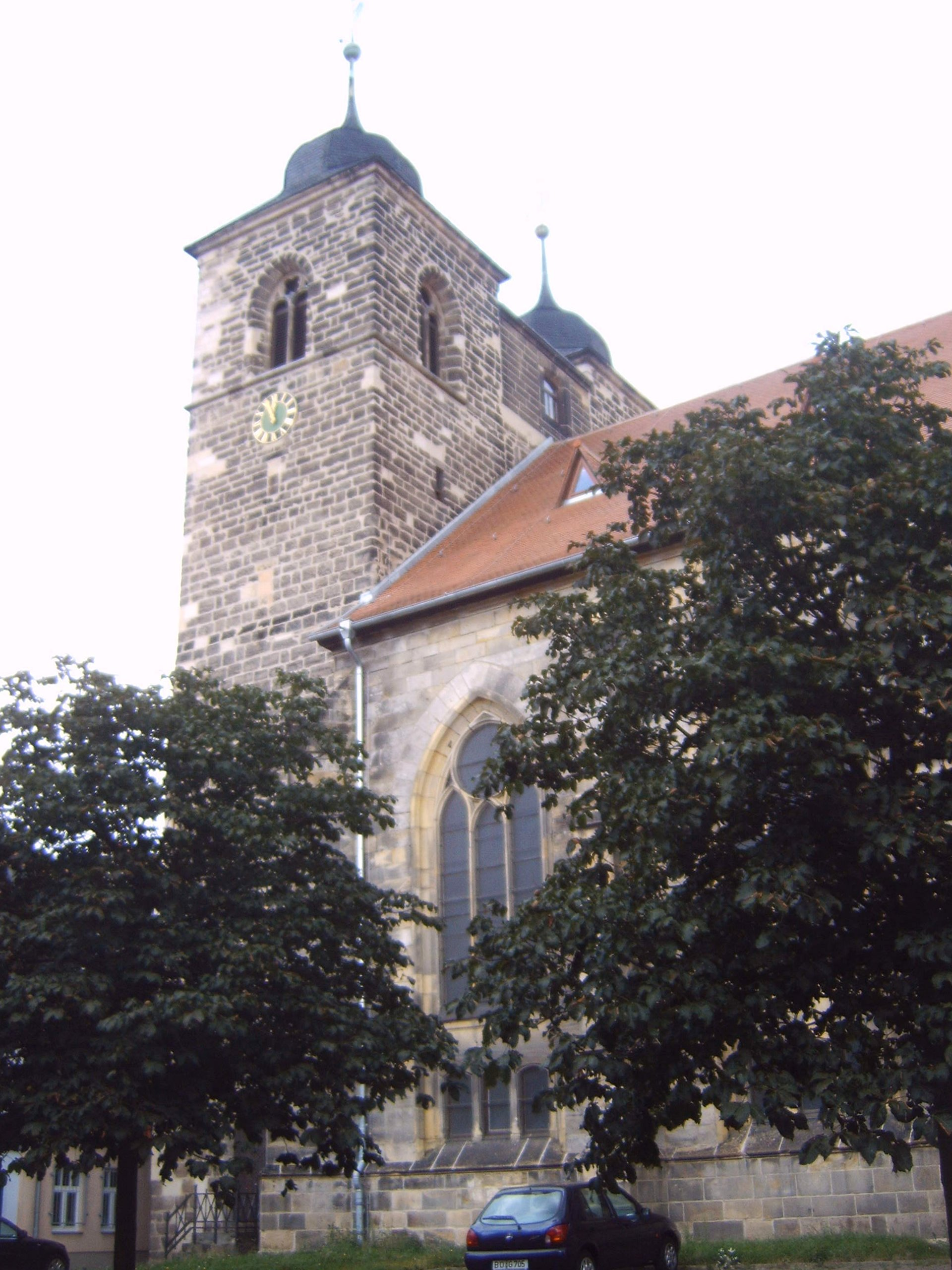 Sankt-Nikolai-Kirche Oschersleben, Türme, Sachsen-Anhalt, Deutschland